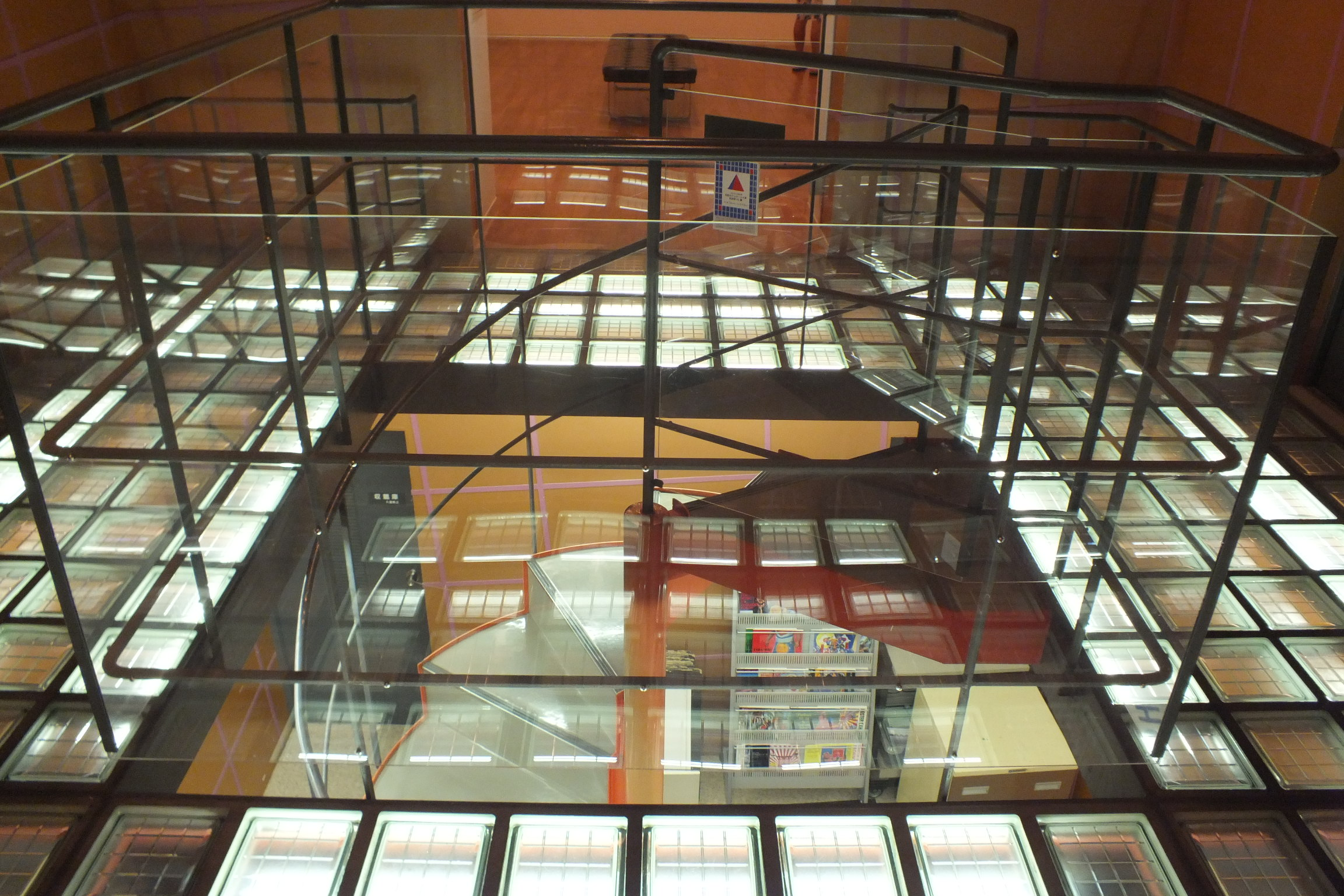 2015-09-06 Okanoyama museum-岡之山美術館